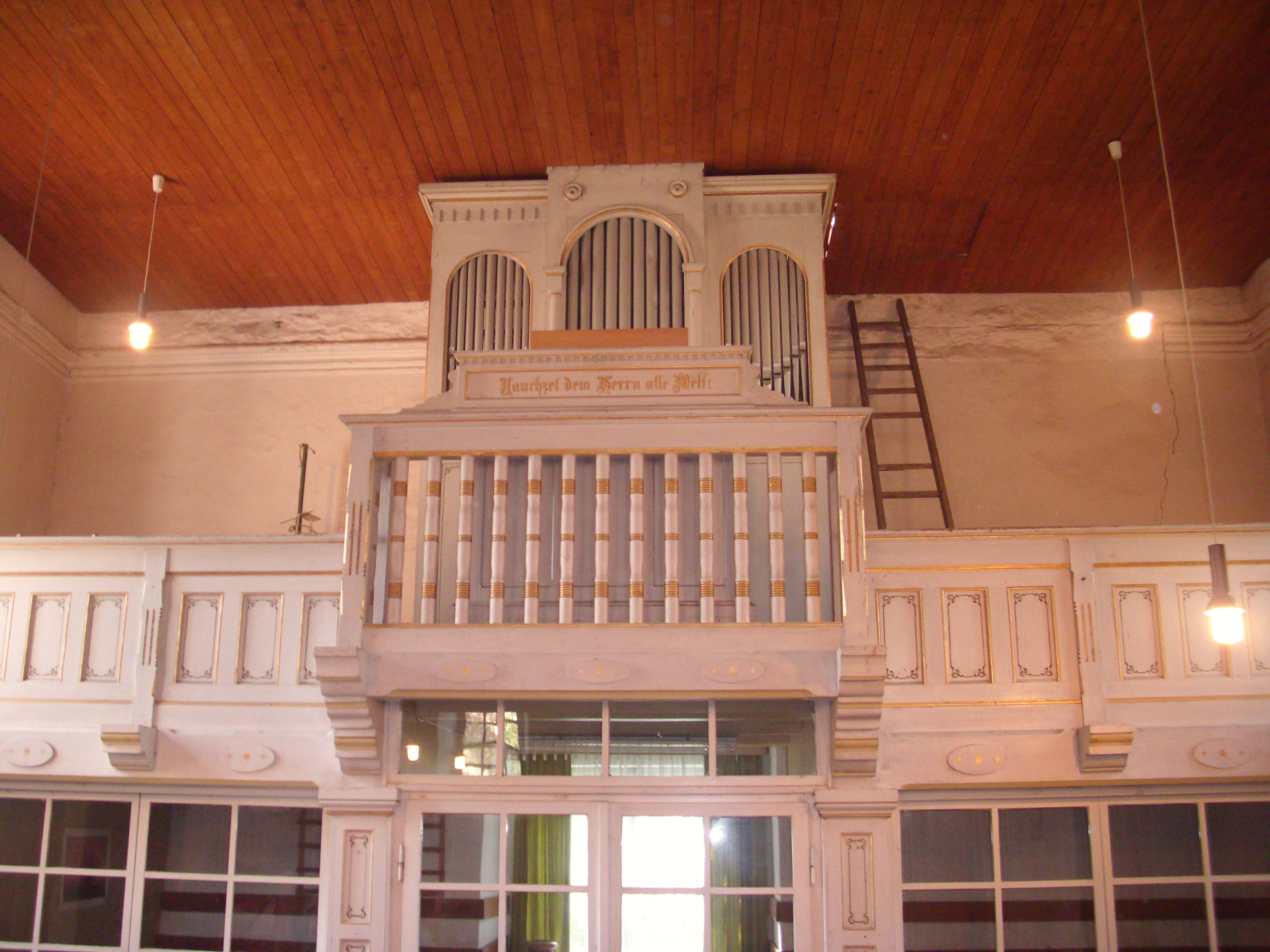 Heinze-Orgel, Kirche Petersdorf bei Briesen, Brandenburg